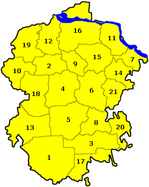 Административно-территориальная карта Чувашии